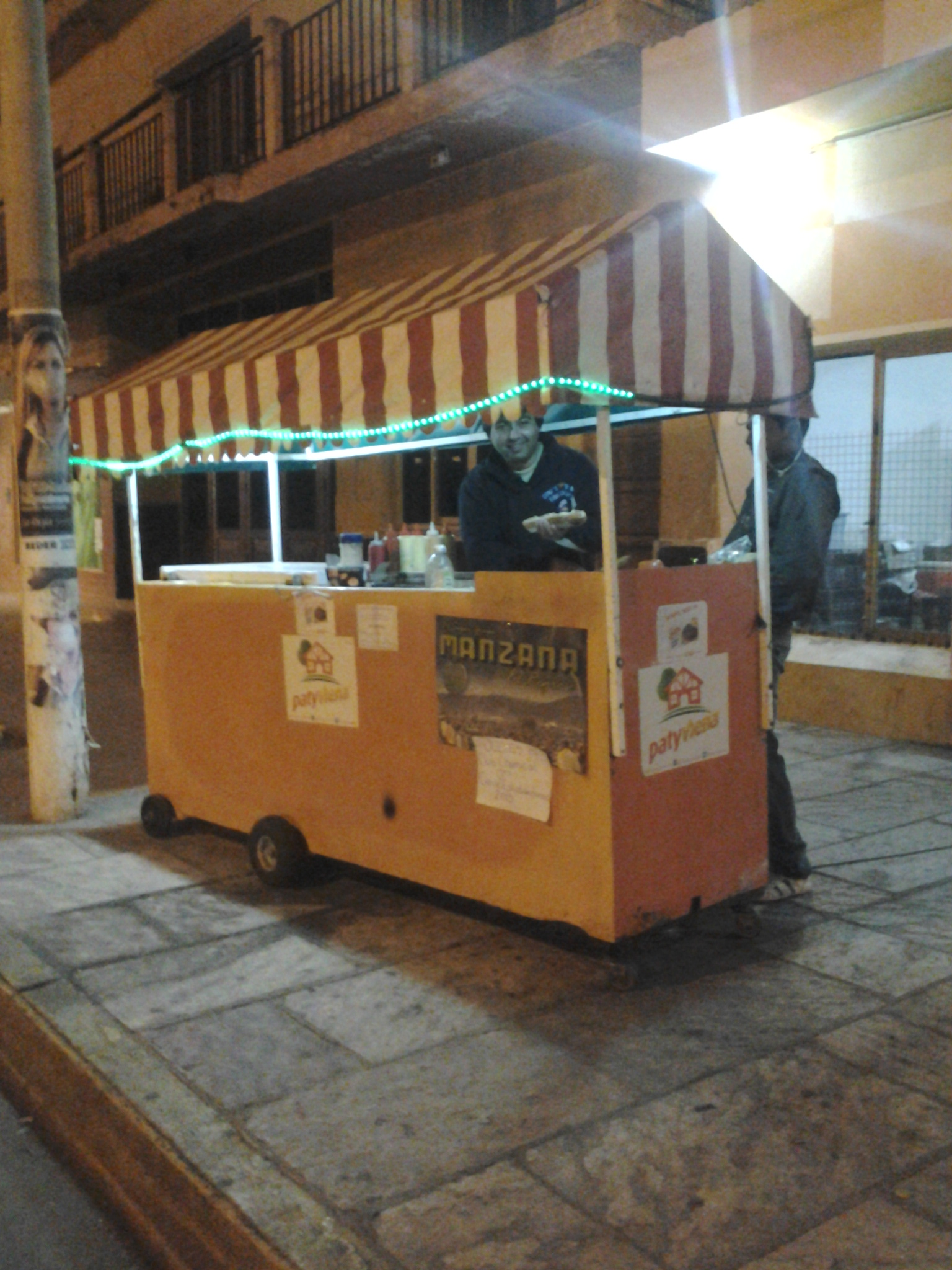 Foto de Mario el panchero, un personaje de las noches de Chamical (municipio en La Rioja, Argentina), que llueva o truene , ronda la plaza-jardin San Martin.